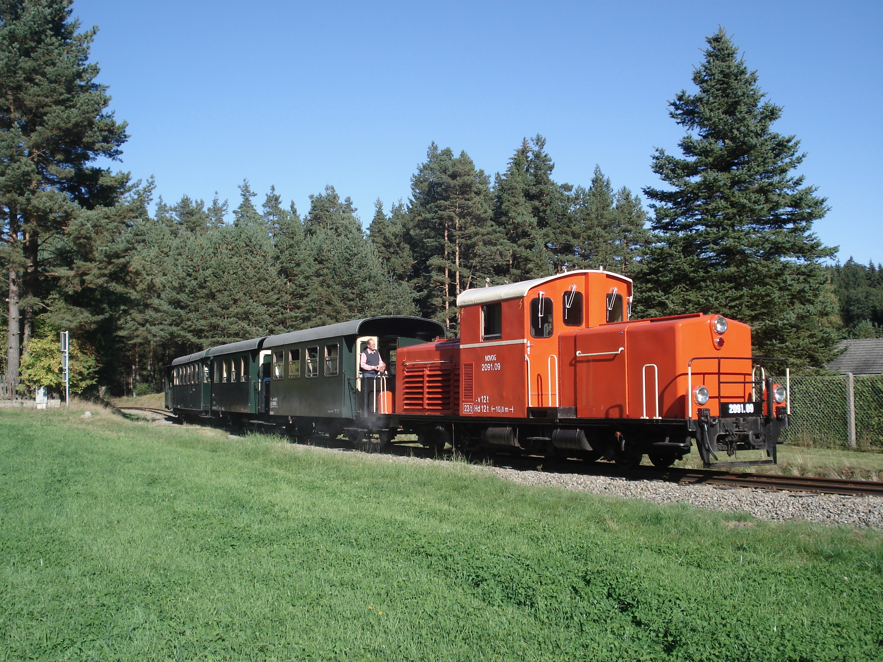 Die NÖVOG 2091.09 bei einer Scheinanfahrt am Nordast der Waldviertler Schmalspurbahn in Finsternau.